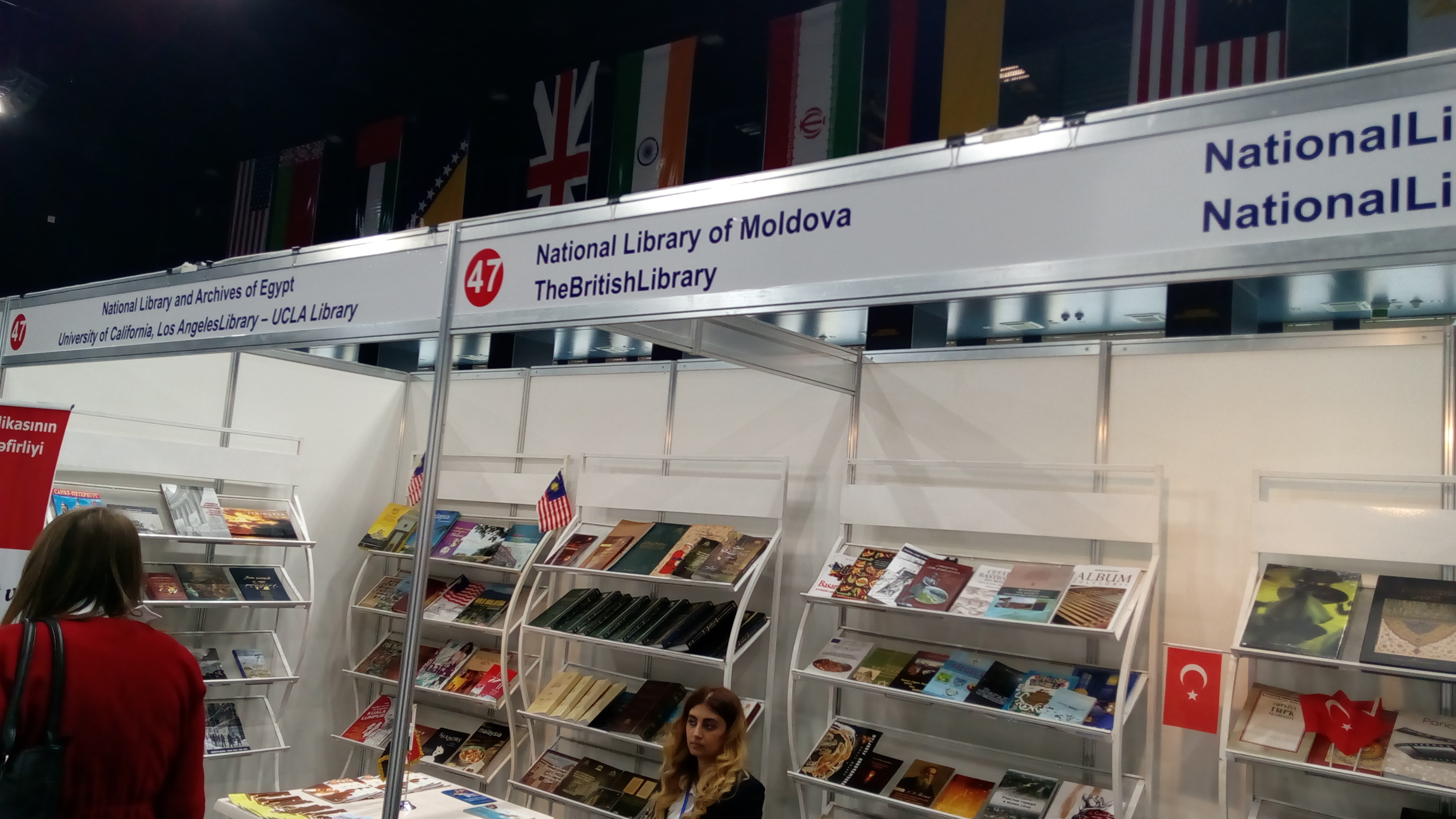 V Bakı Beynəlxalq Kitab Sərgi-Yarmarkası